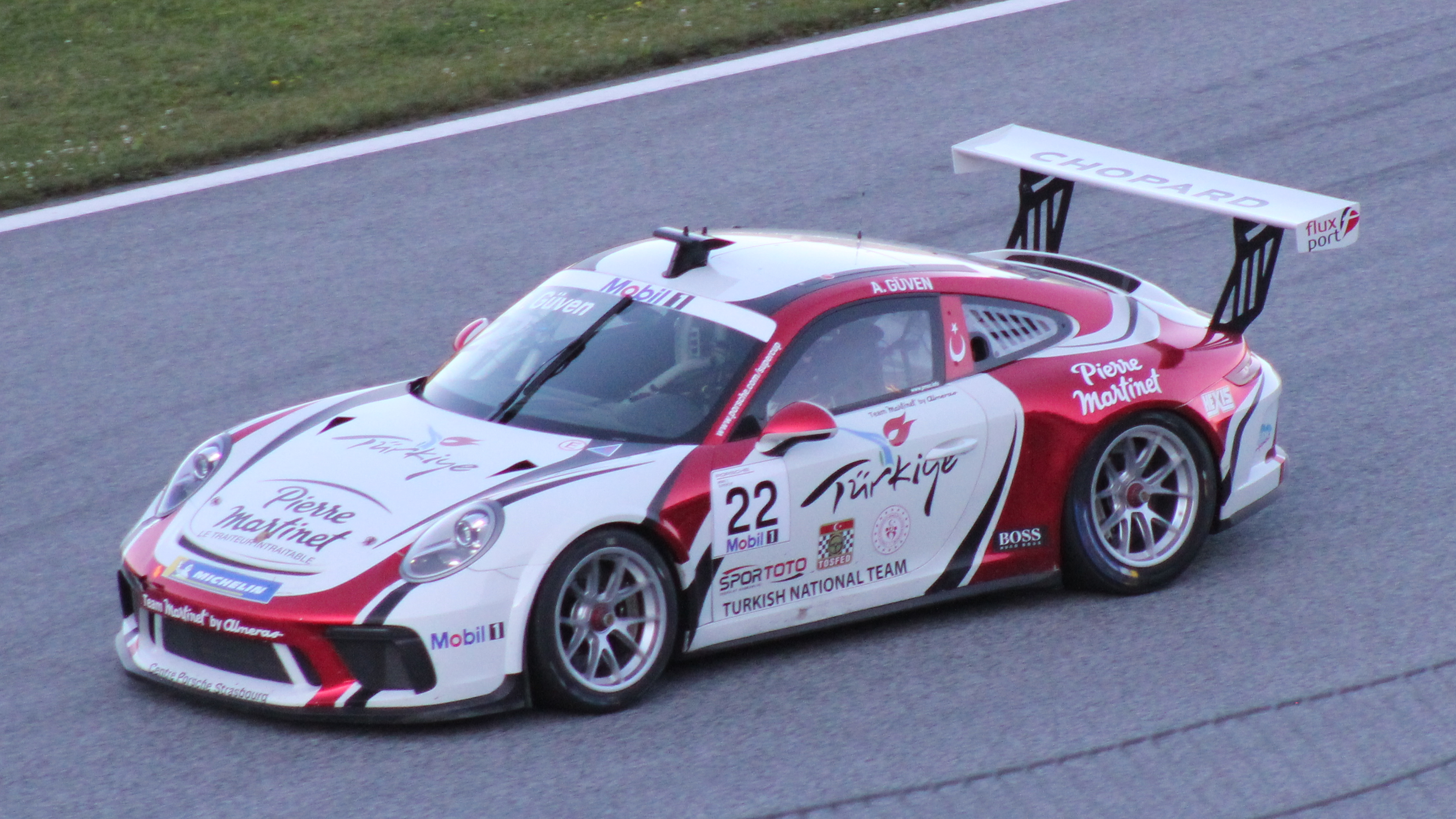 Güven beim Rennwochenende in Österreich 2019